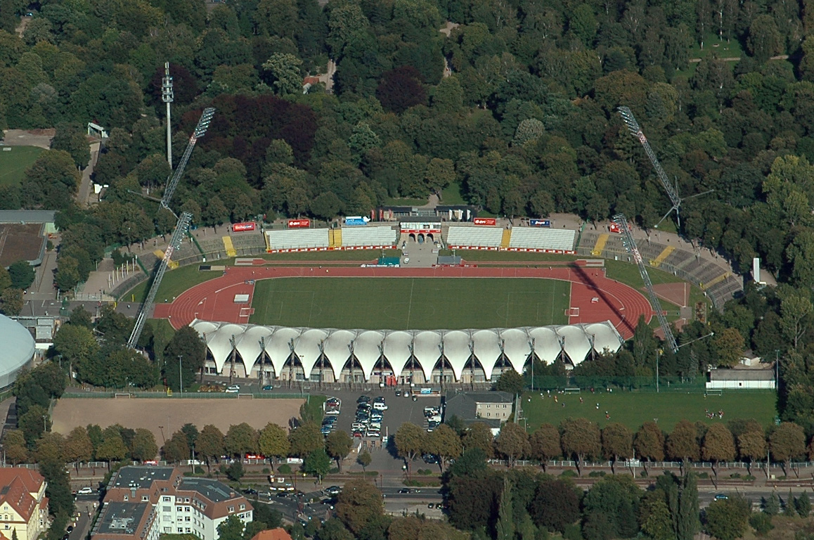 Luftbild vom Steigerwaldstadion an der Arnstädter Straße in Erfurt